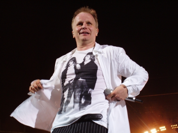 Herbert Grönemeyer beim Konzert der "12-Tour" im Berliner Olympiastadion